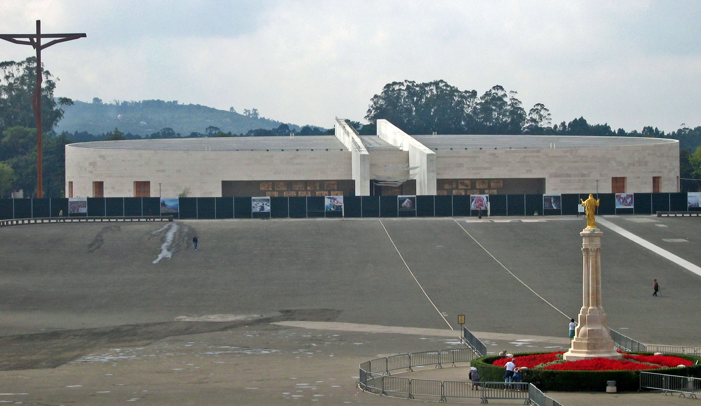 Dräifaltegkeetskierch zu Fatima.